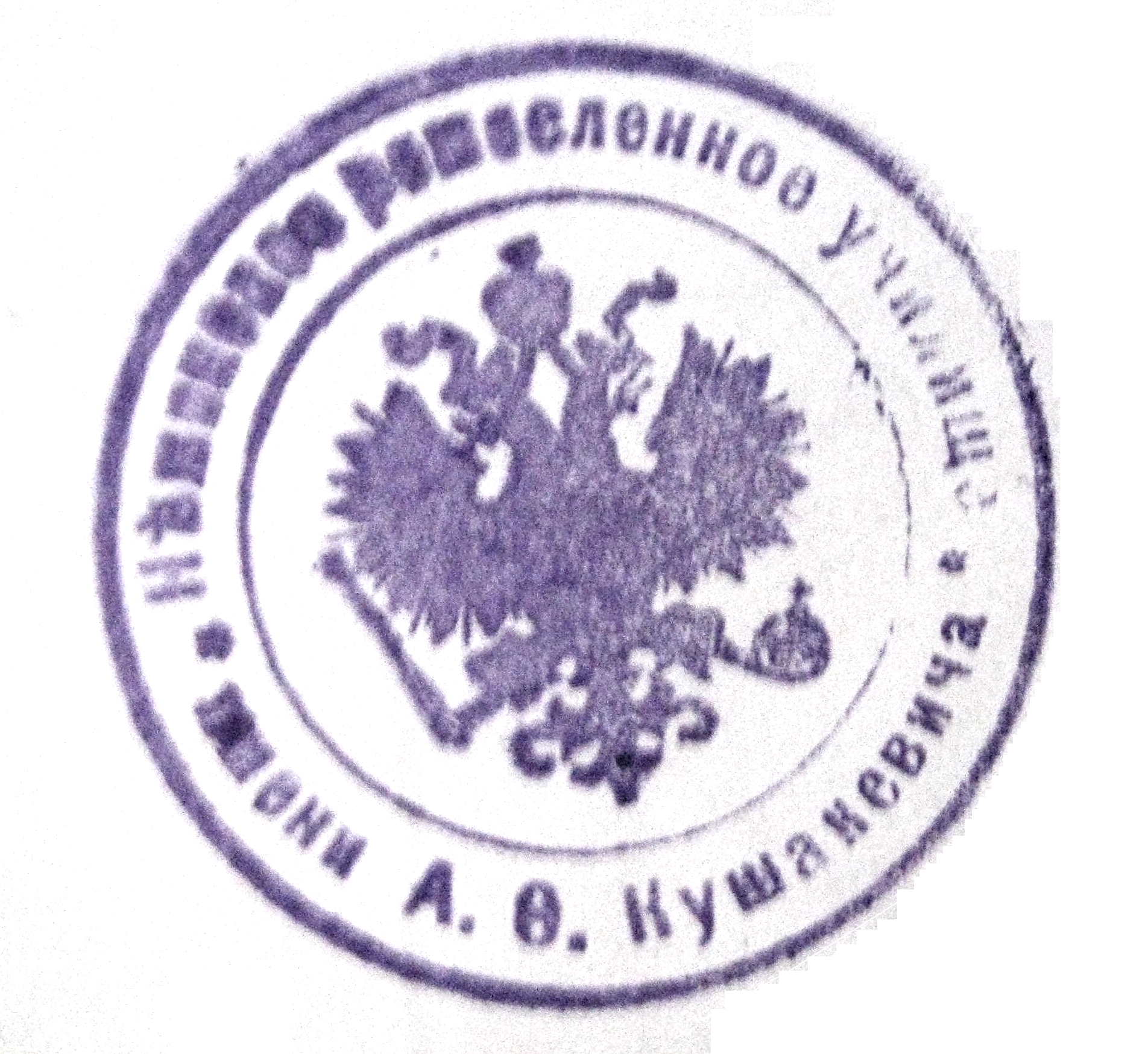 Печатка Ніжиського ремісничого училища